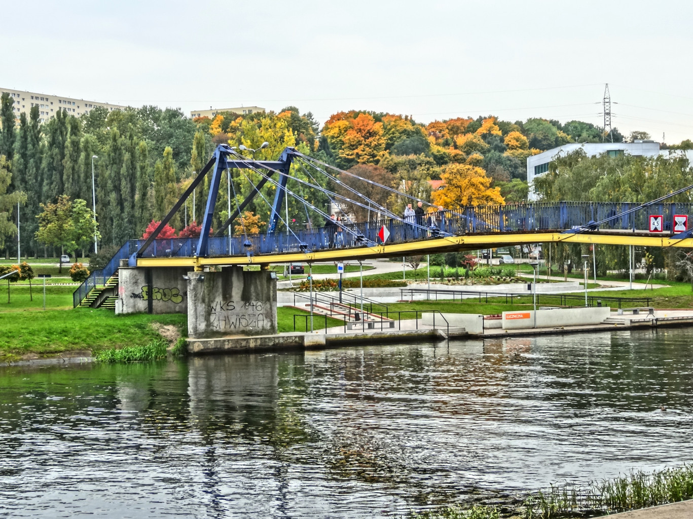 Kładka dla pieszych im. Esperanto przez Brdę w Bydgoszczy